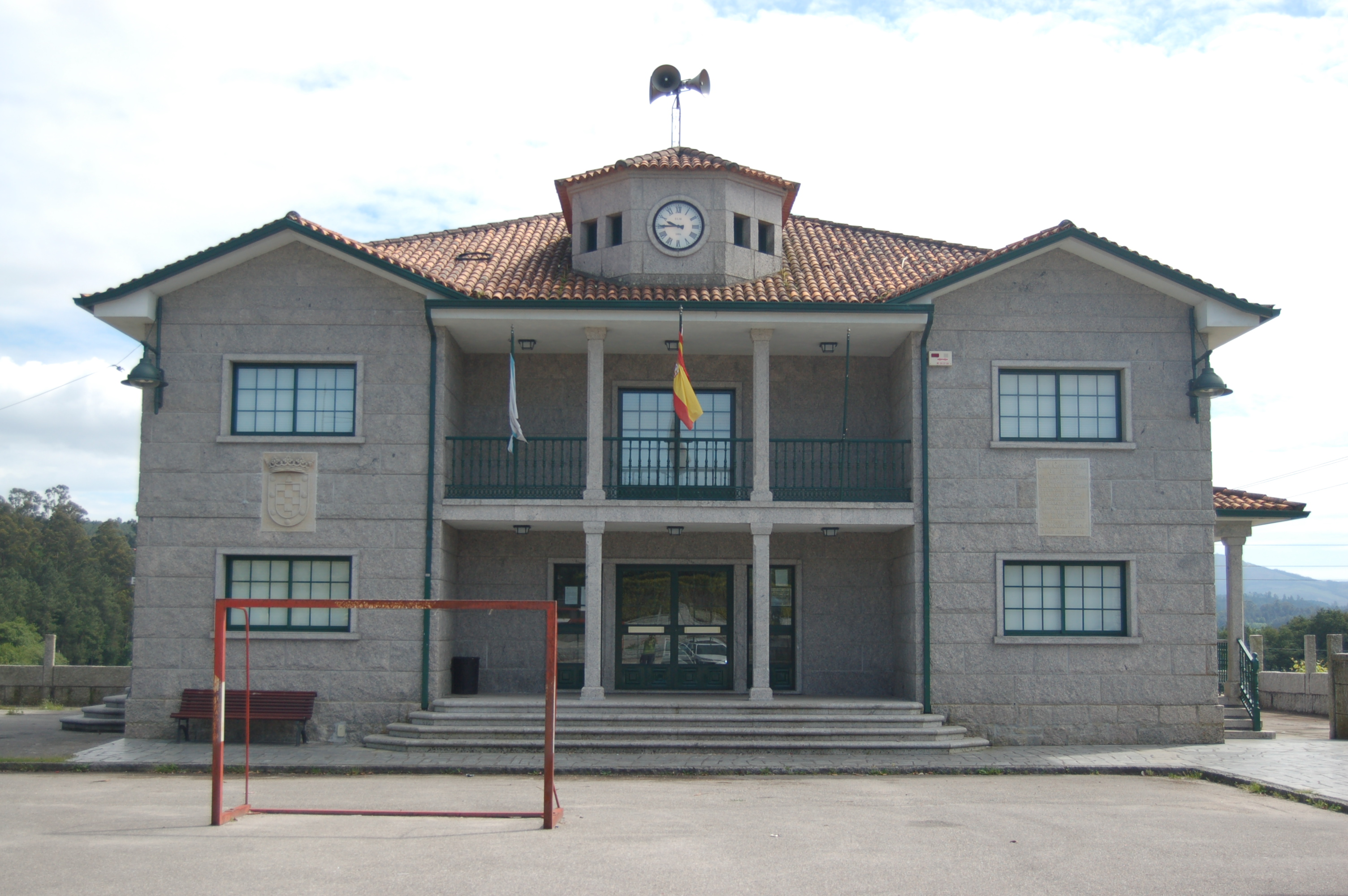 Sede da Entidade local menor de Arcos da Condesa (Caldas de Reis)